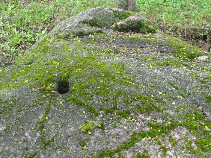 Velnio akmuo